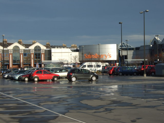 Sainsbury's Berryden store, Aberdeen